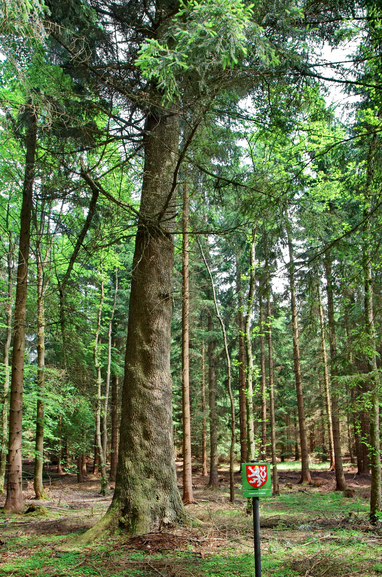 Památný strom Jedle pod hůrkou, okres Karlovy Vary